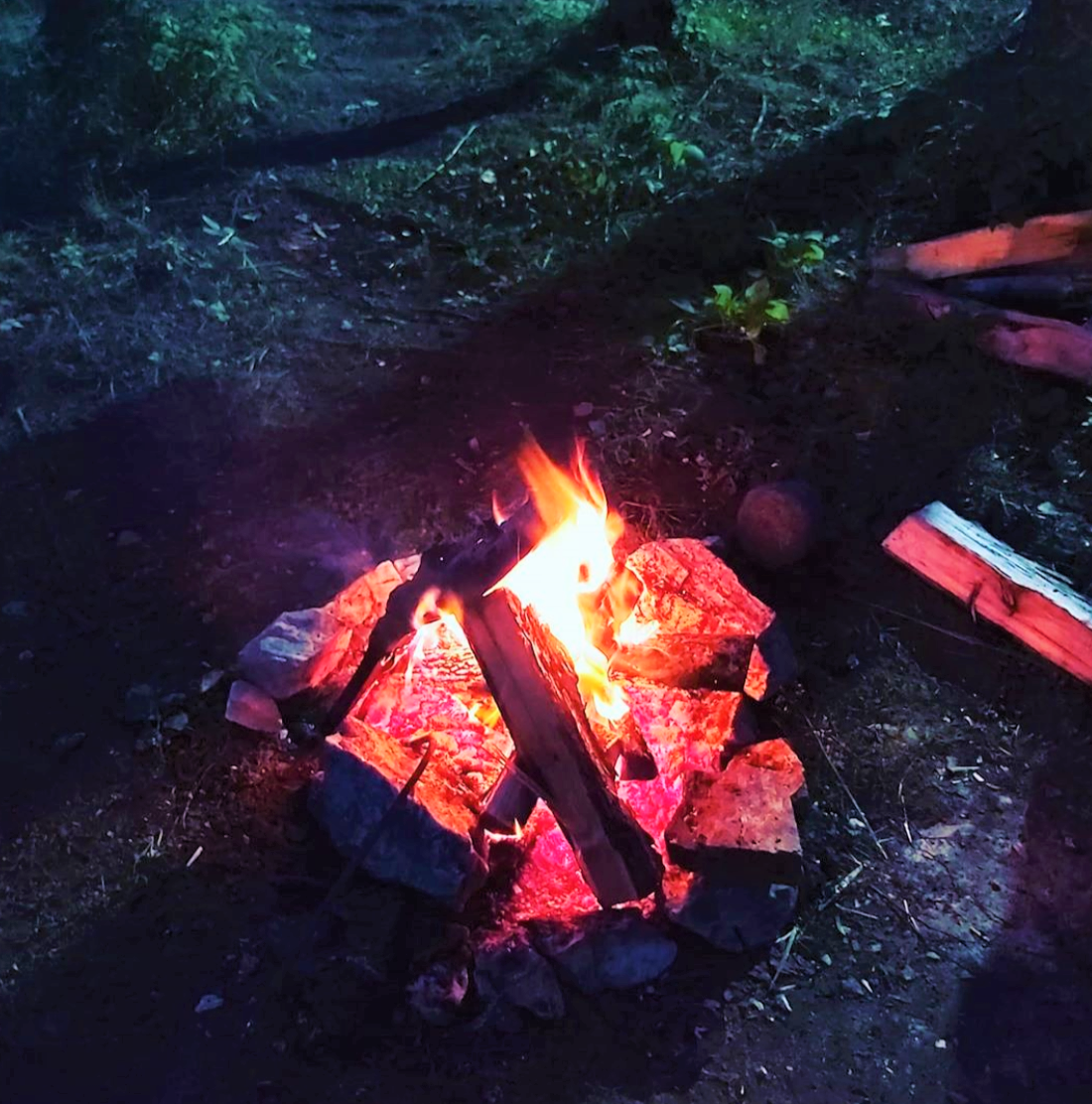 Firewood in the fire